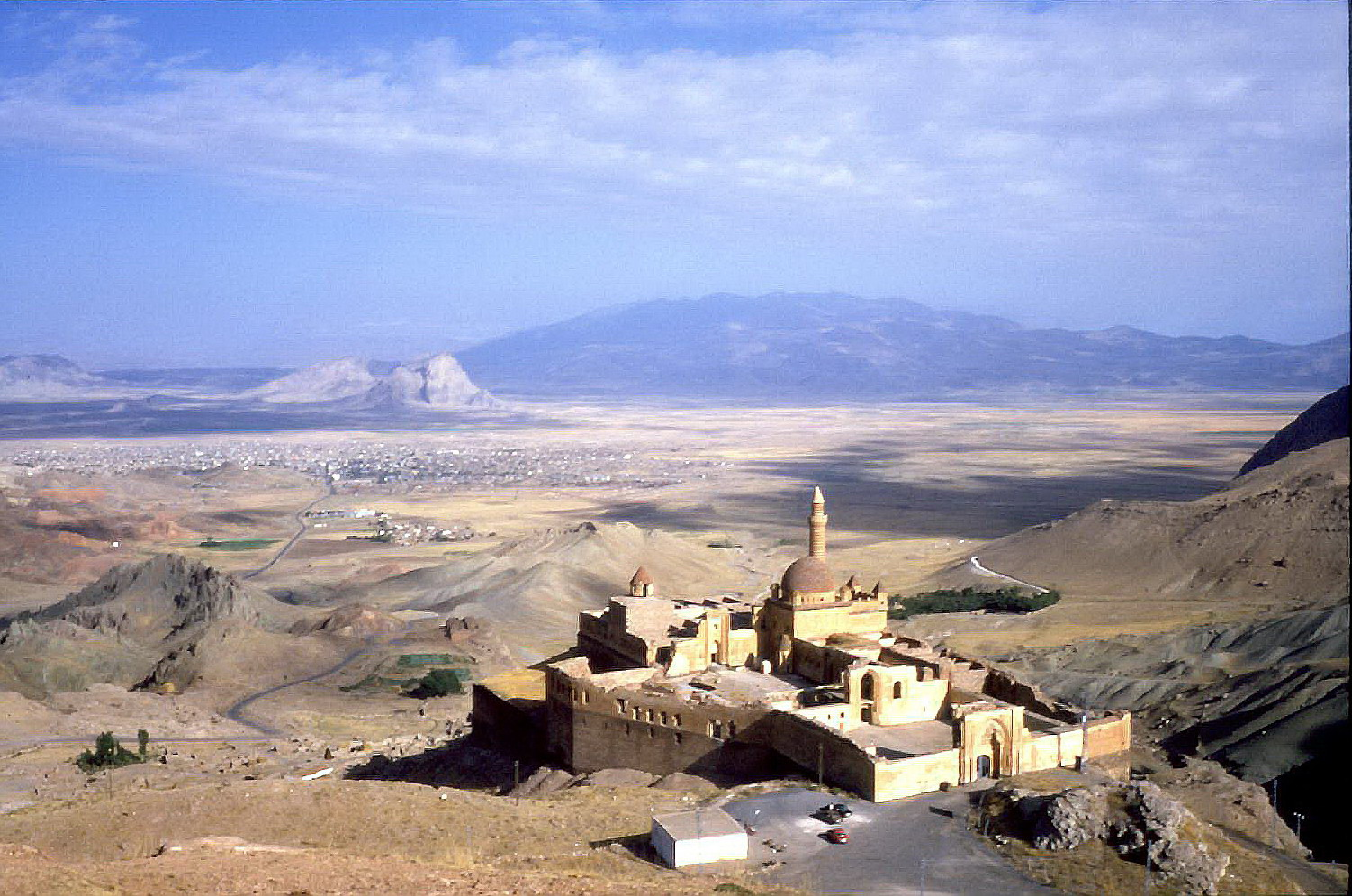 ishak pasha palace-1